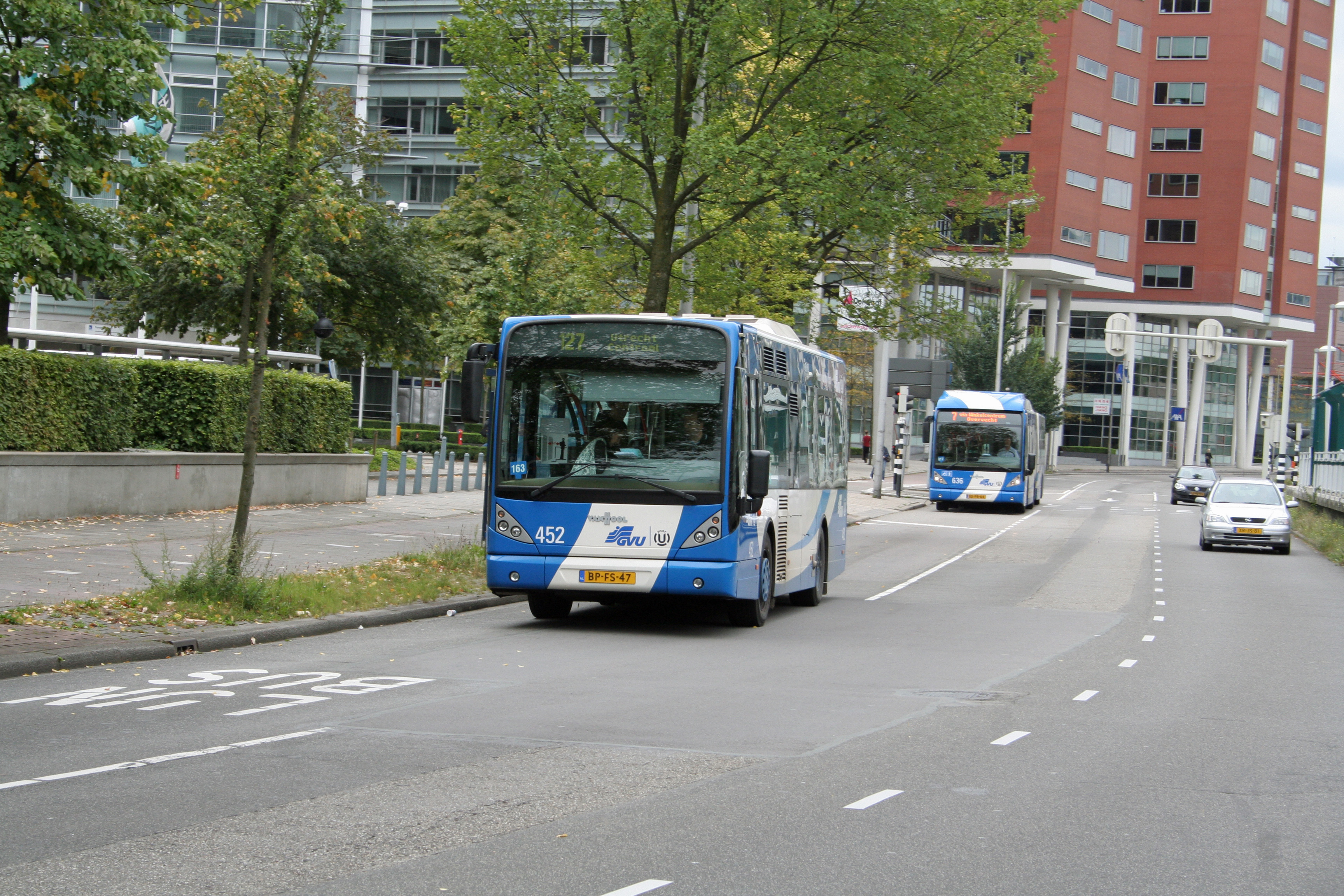 GVU-bussen 452 & 636 rijden op de 'busstrook alleen voor openbaar vervoer' op de 'Graadt van Roggenweg' te Utrecht (NL)